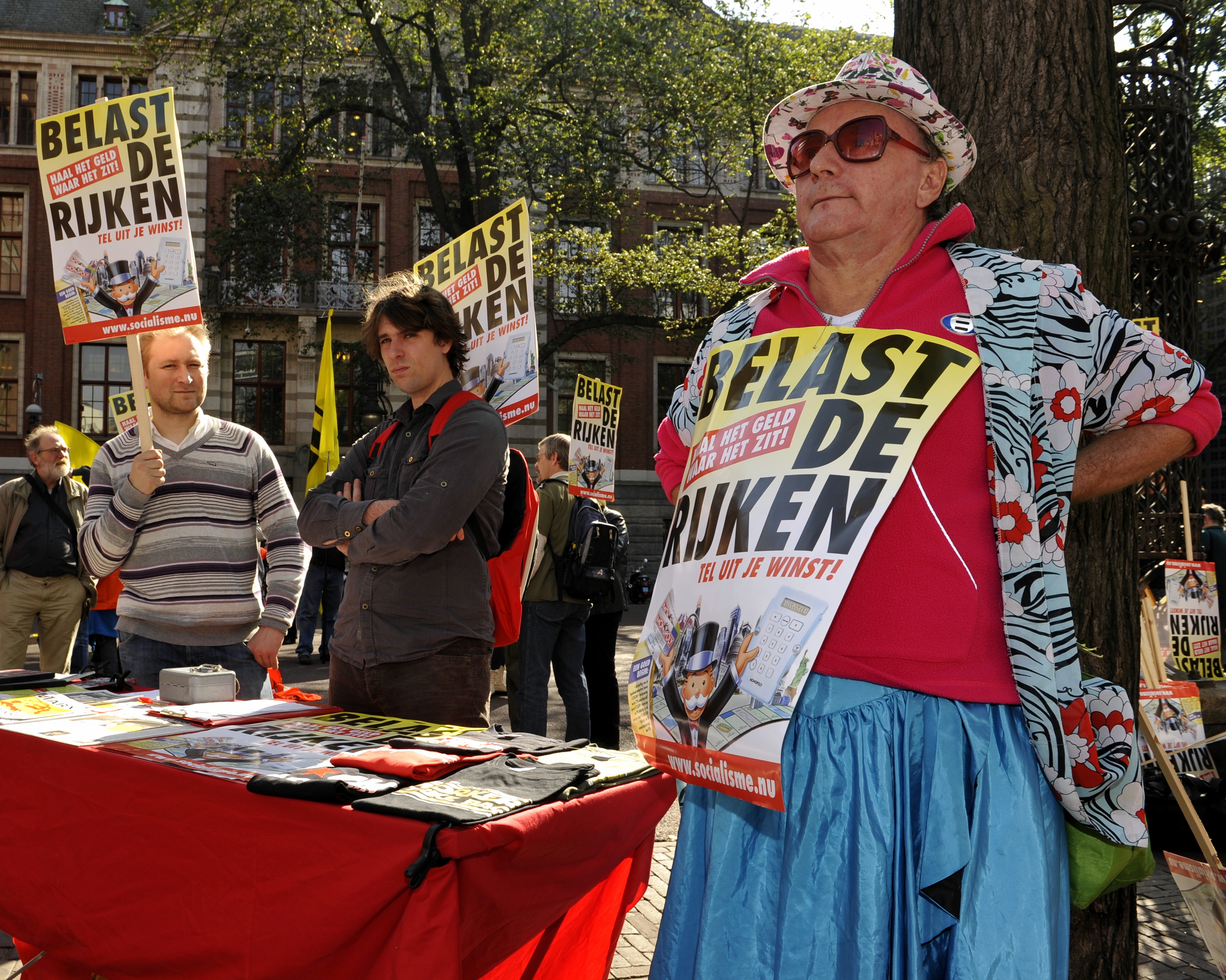 Omsingel De Nederlandsche Bank